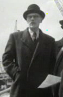 Minister van Verkeer en Waterstaat, mr. D.G.W. Spitzen.